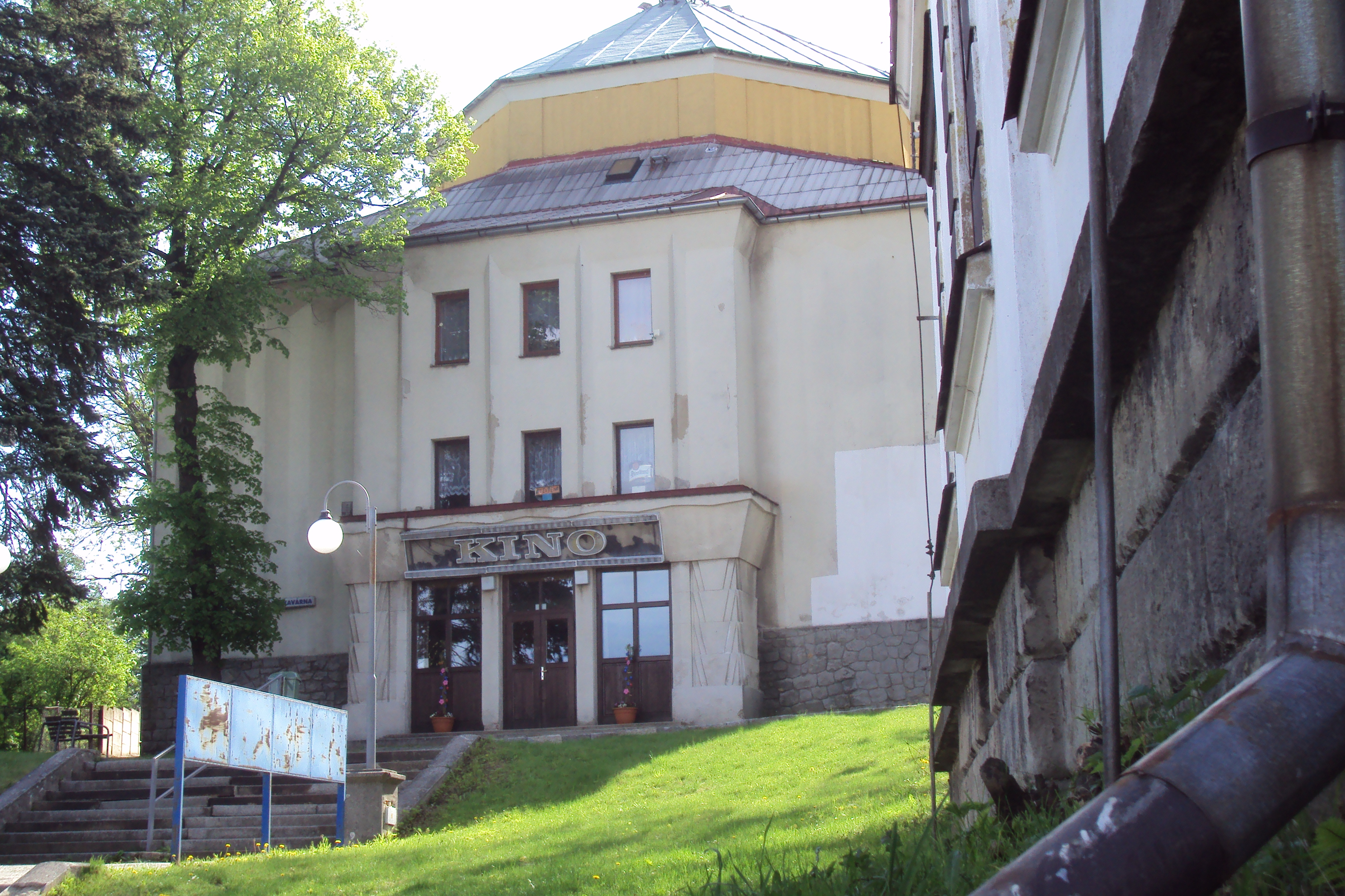 Kino je 100 metrů vedle radnice